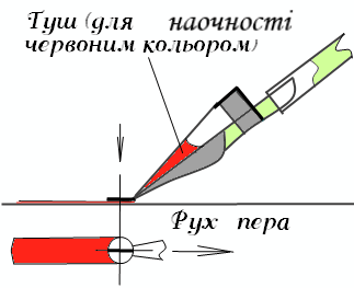 Цей файл зробив я сам. Ескіз демонструє принцип написання шрифтів пером Редіс